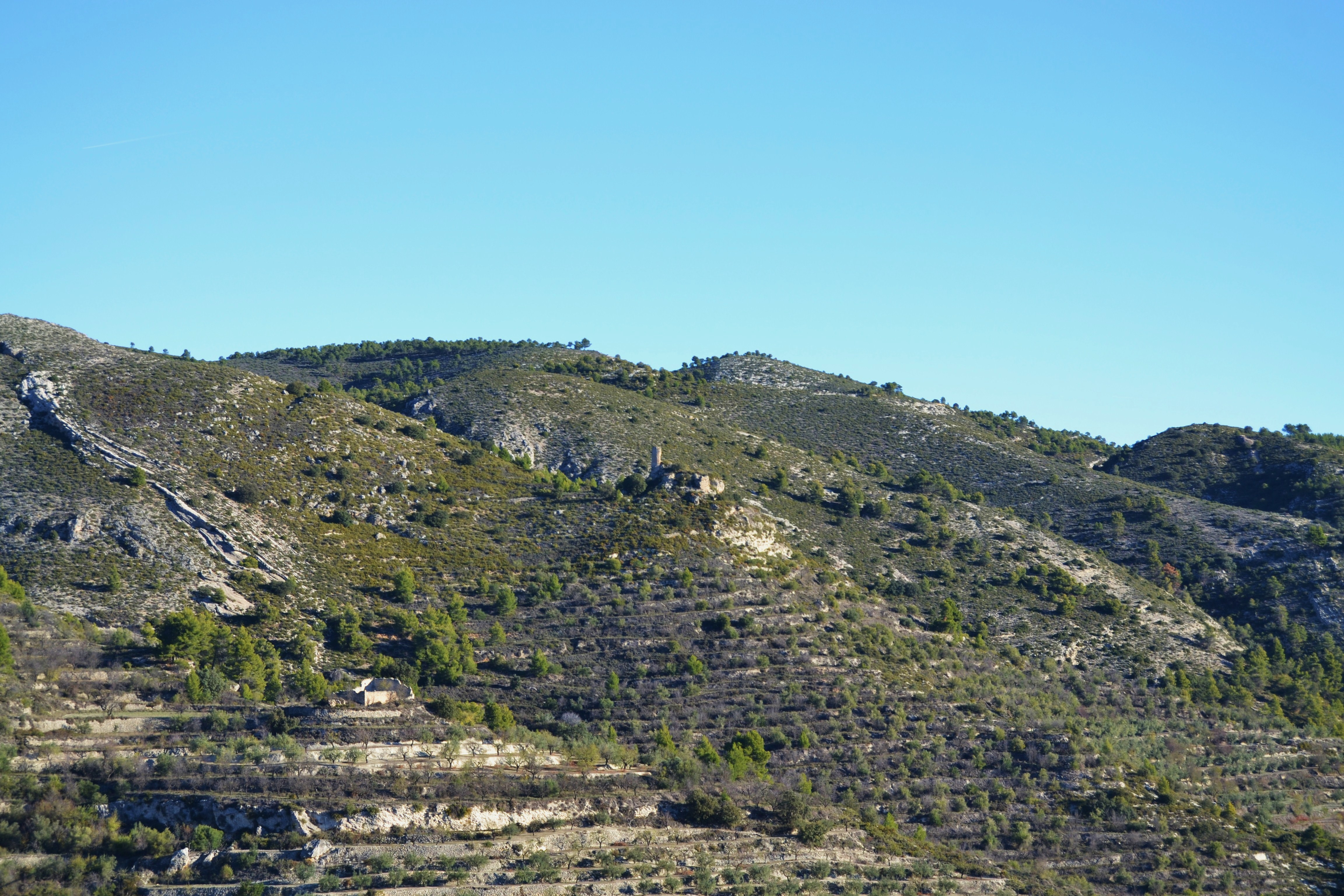 Vista llunyana del castell de Seta.